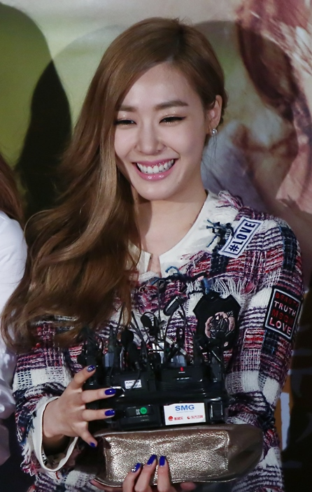 Português do Brasil: Tiffany Hwang at VIP premiere of film My Brilliant Life on August 28, 2014.Português do Brasil: Tiffany Hwang na estreia VIP do filme My Brilliant Life em 28 de agosto de 2014.